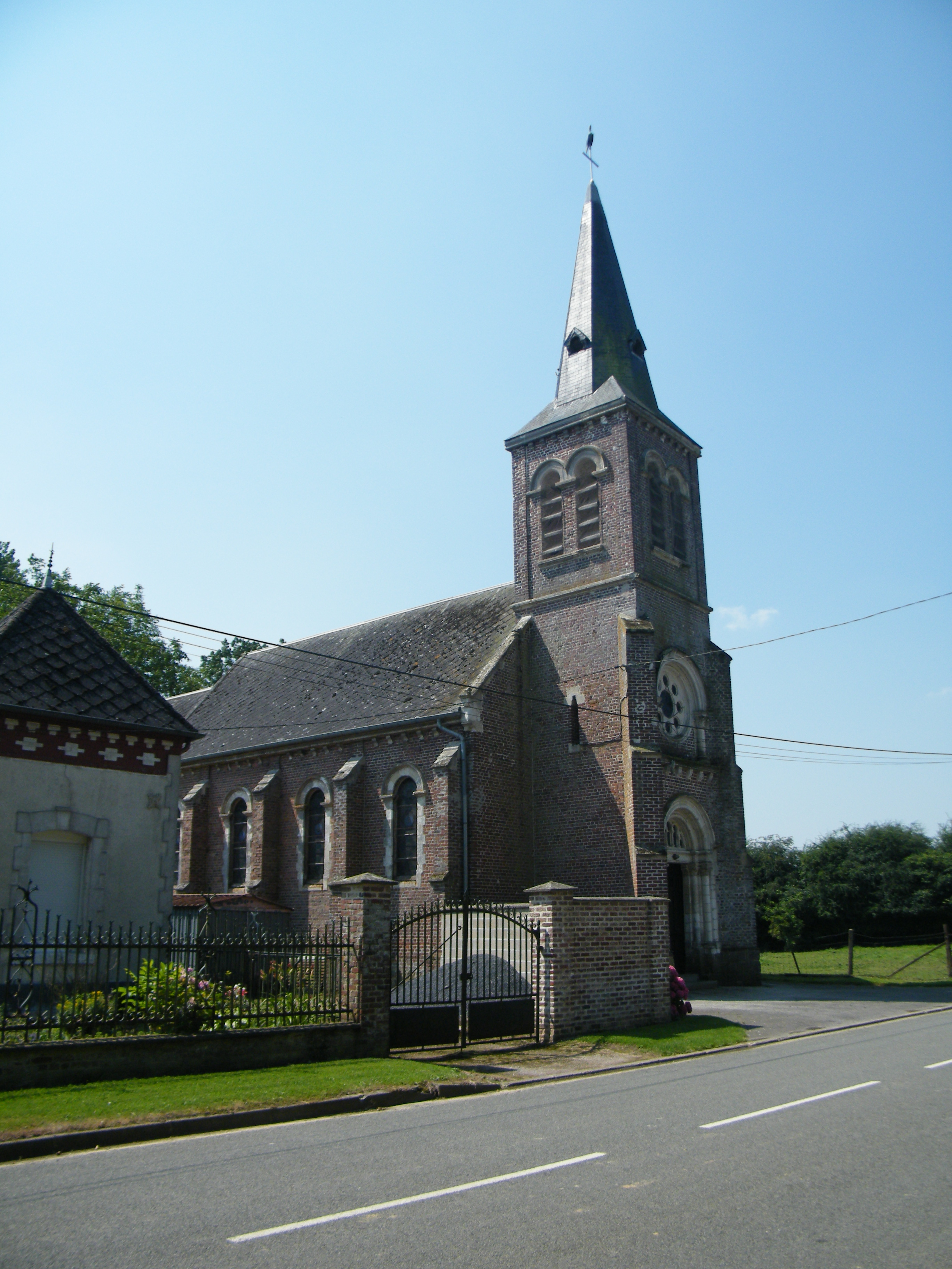 église.